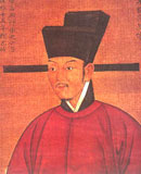 Emperor Zhezong